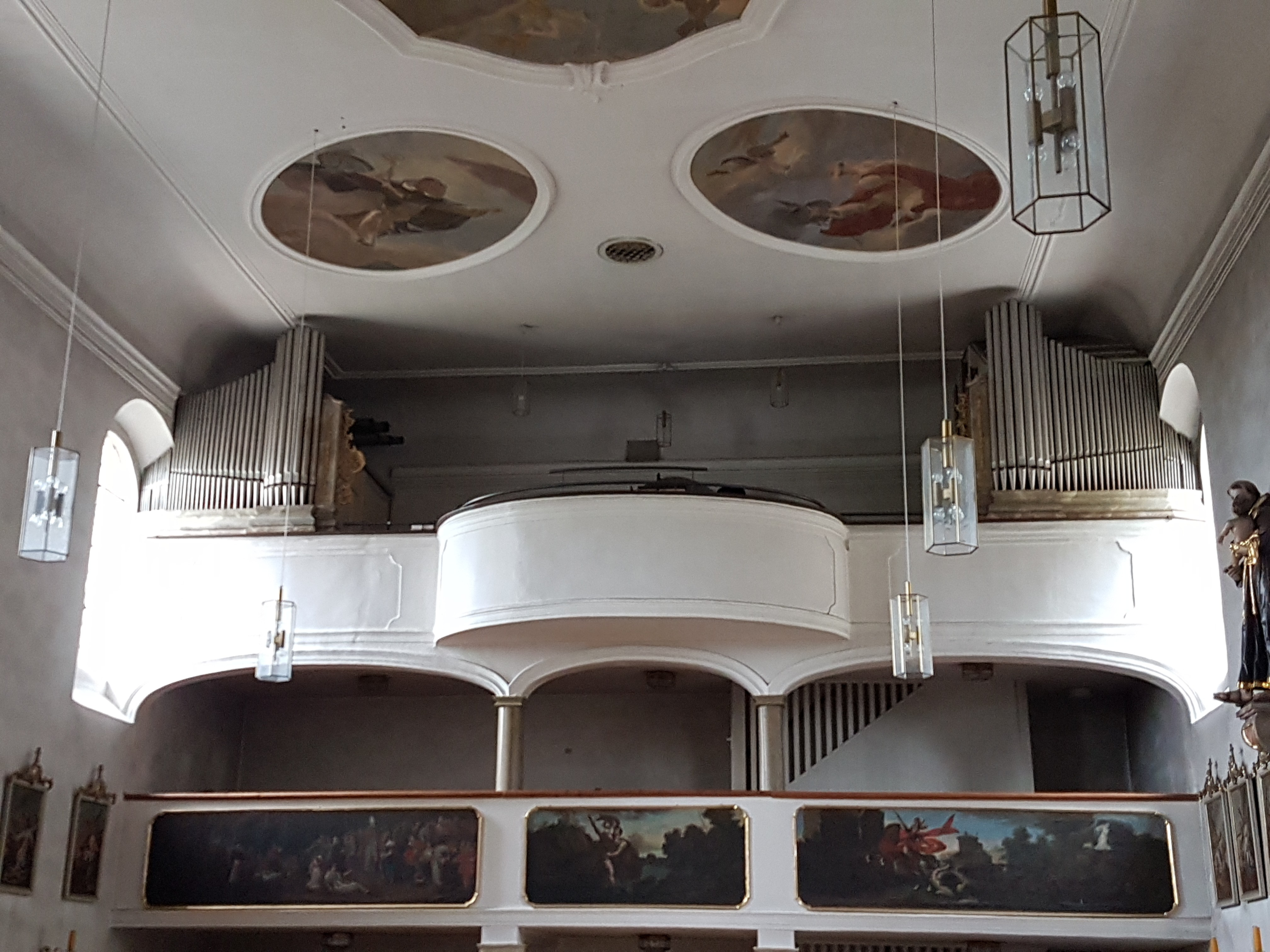 Orgel der Pfarrkirche Donaustauf, erbaut von Eduard Hirnschrodt